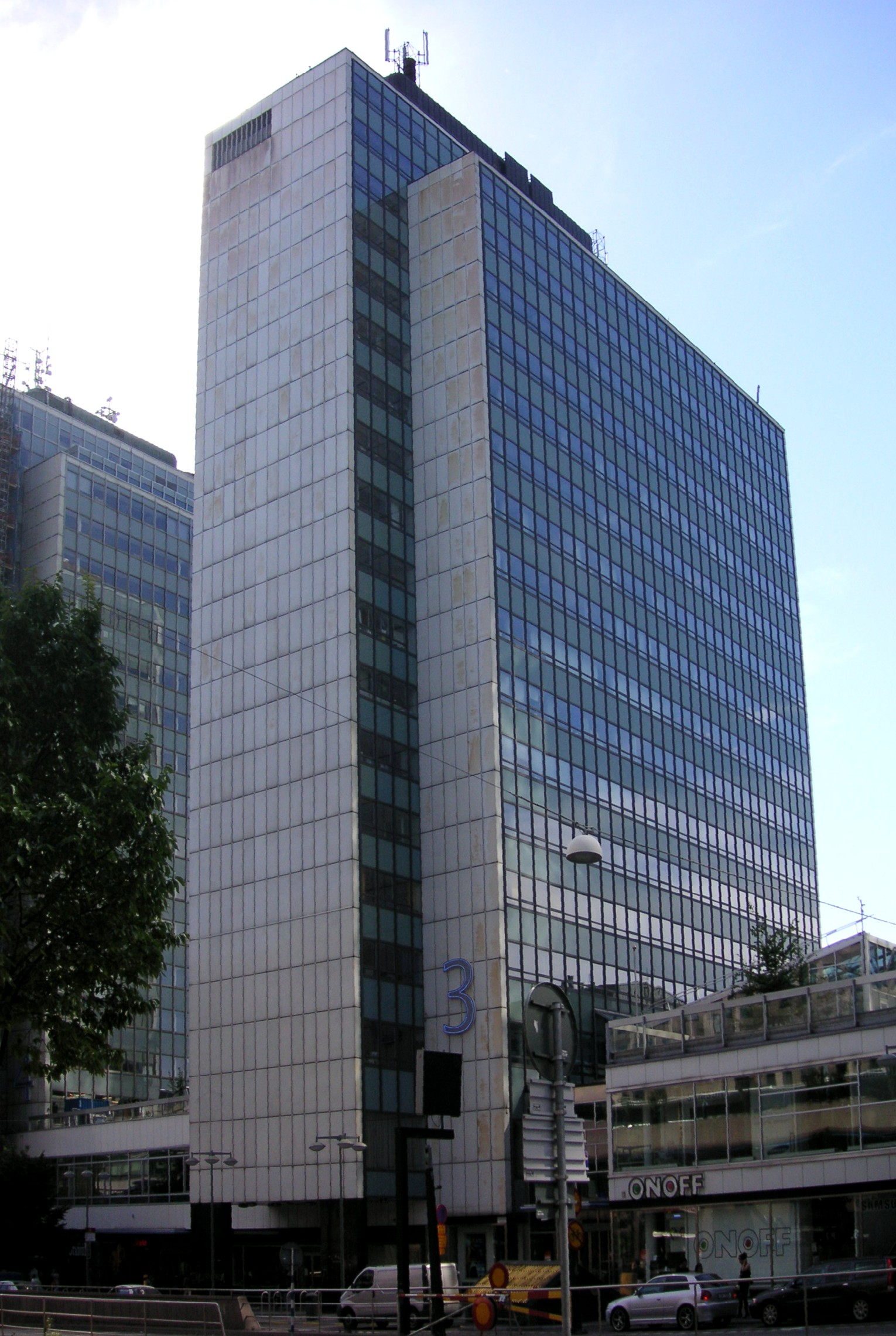 Tredje höghuset vid Sergels torg